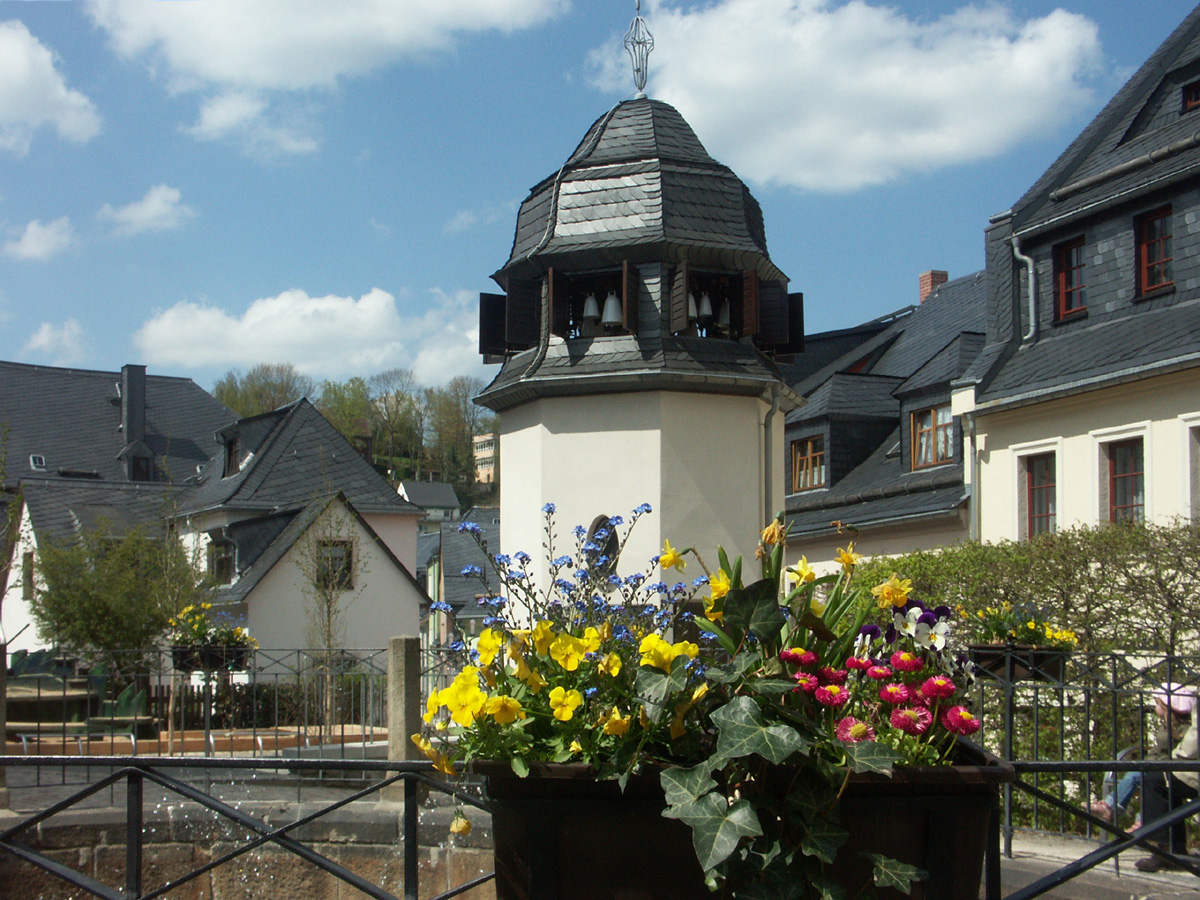 Schwarzenberg/Erzg.: Das Glockenspiel